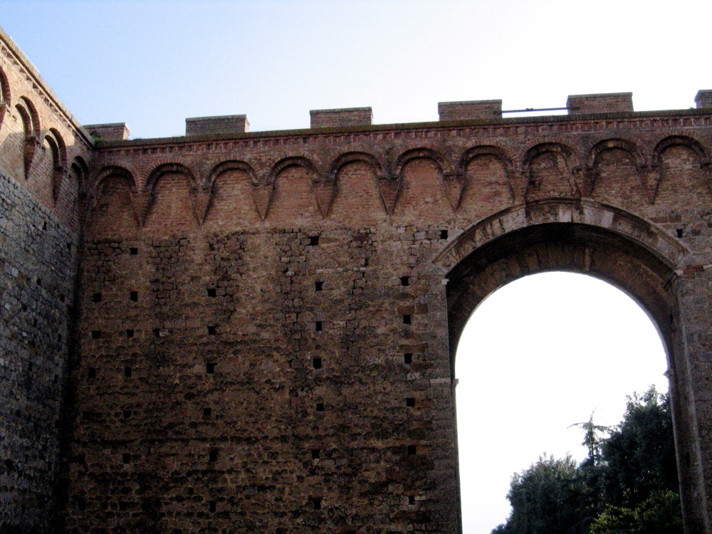 Mura cittadine, Siena, Italia